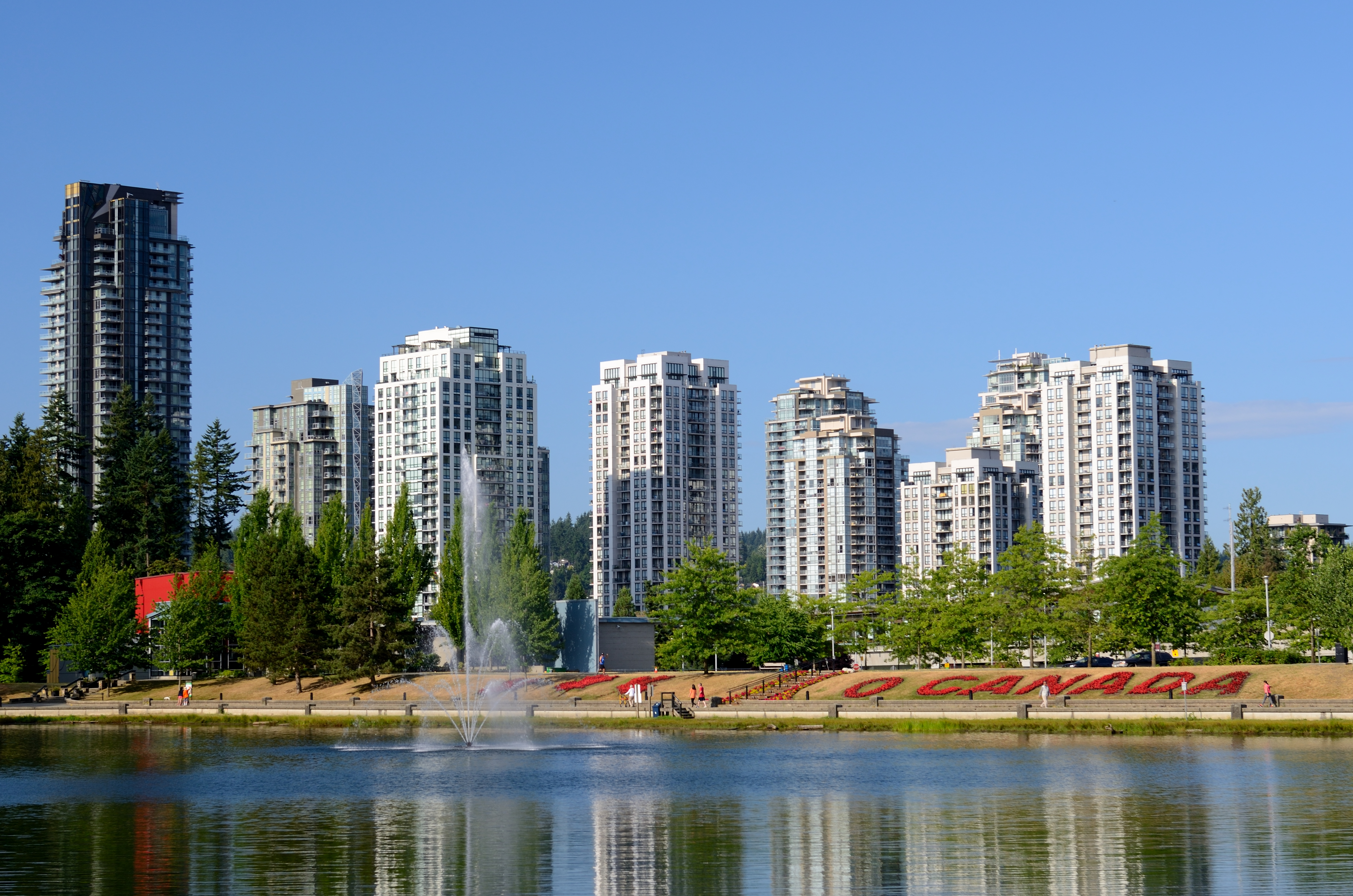 Coquitlam Lafarge Lake